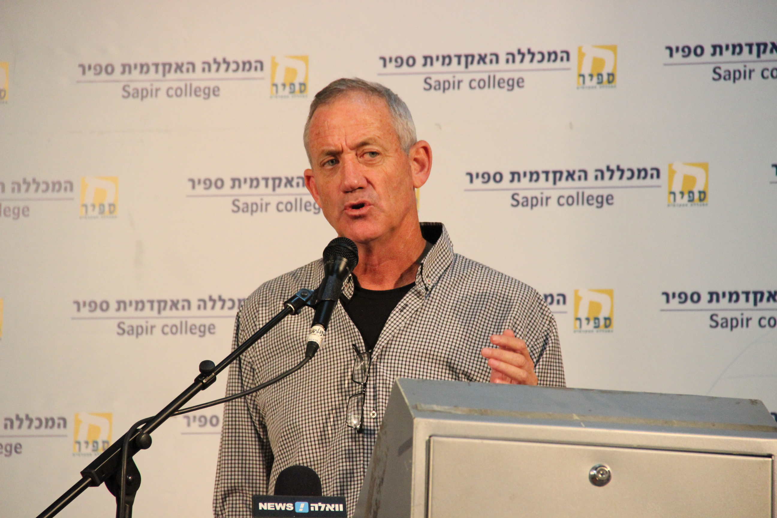 כנס שדרות לחברה במכללה האקדמית ספיר ובעיר שדרות 2015